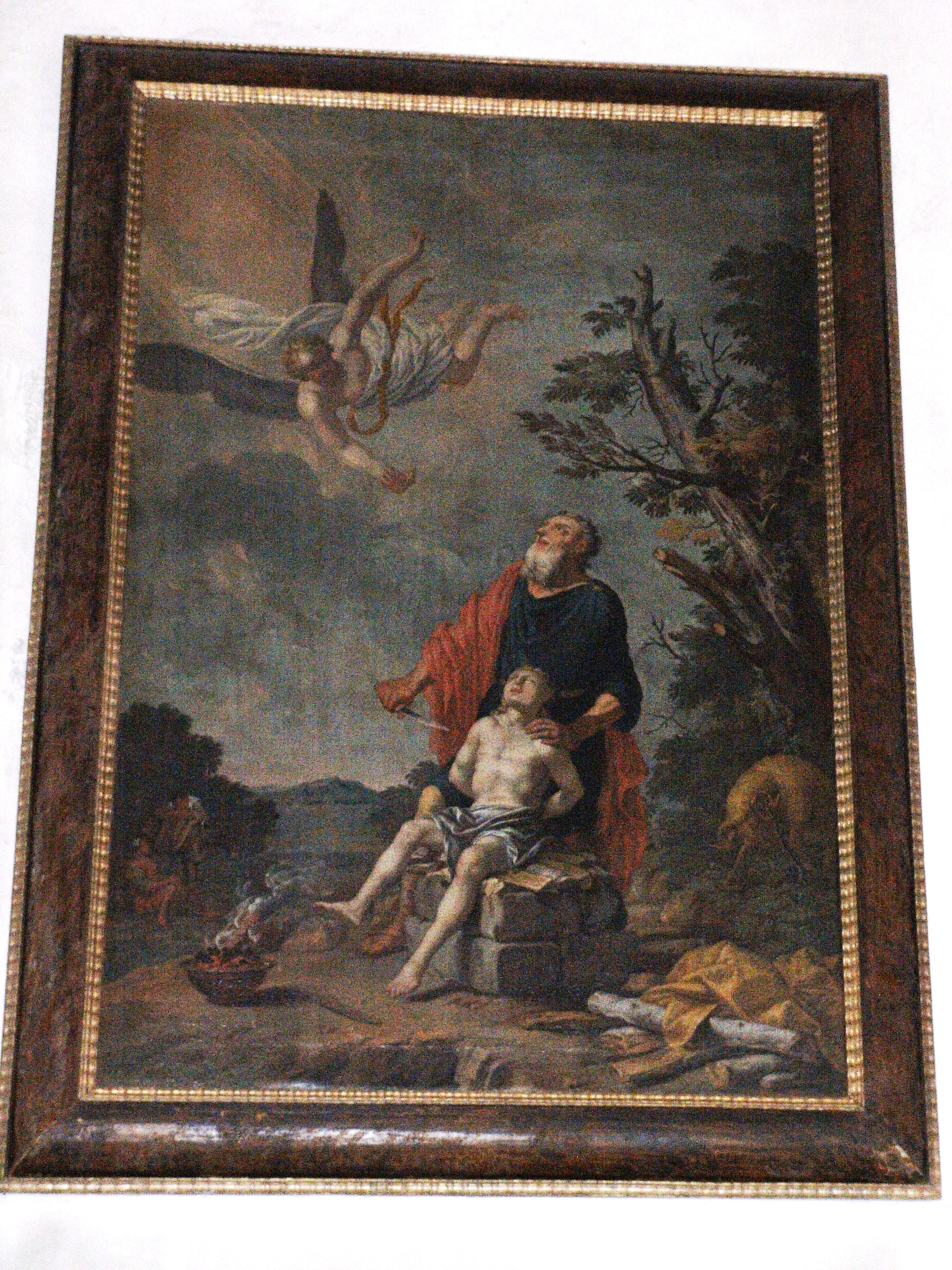 Das Ölgemälde der Opferung Abrahams Sohn in der Dreieinigkeitskirche Buxach